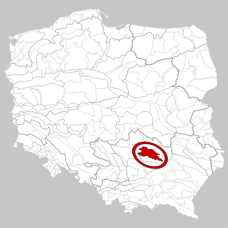 Physico-geographical regionalization of Poland Mezoregion 342.34-5 Holy Cross Mountains Regionalizacja fizycznogeograficzna Polski Mezoregion 342.34-5 Góry Świętokrzyskie